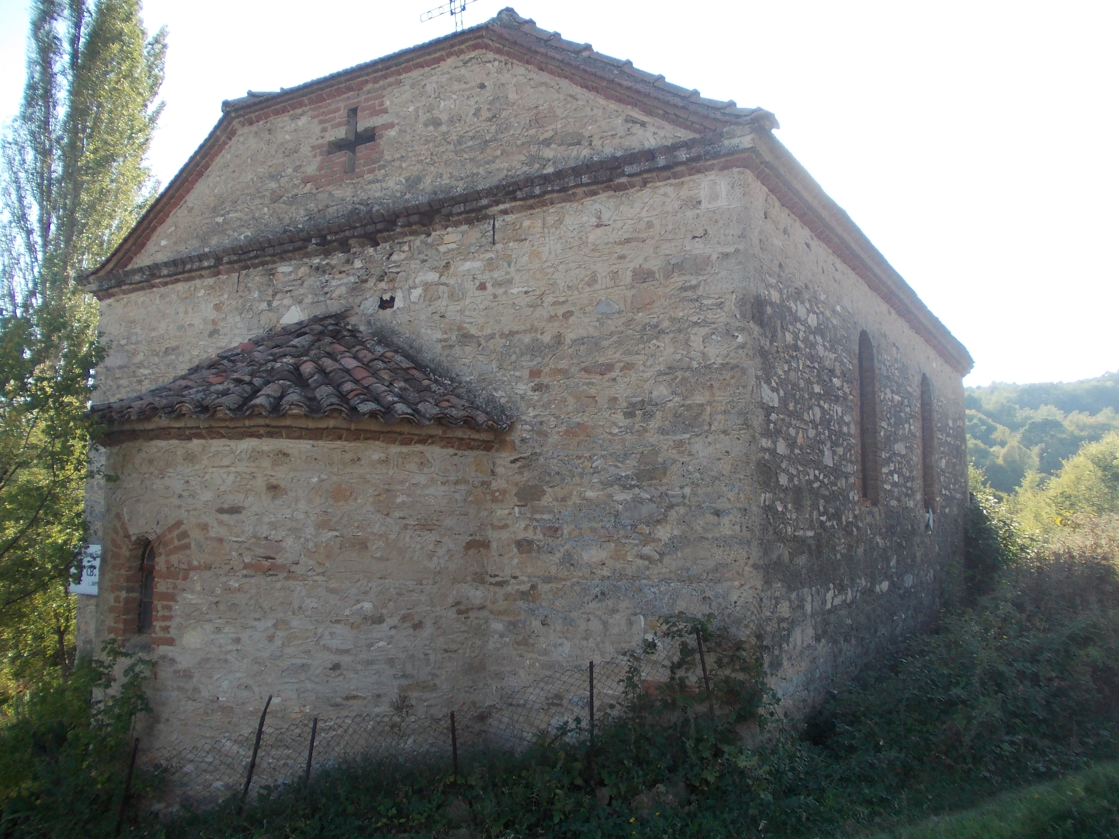 црква св.Петка во село Варварица општина Васлиево